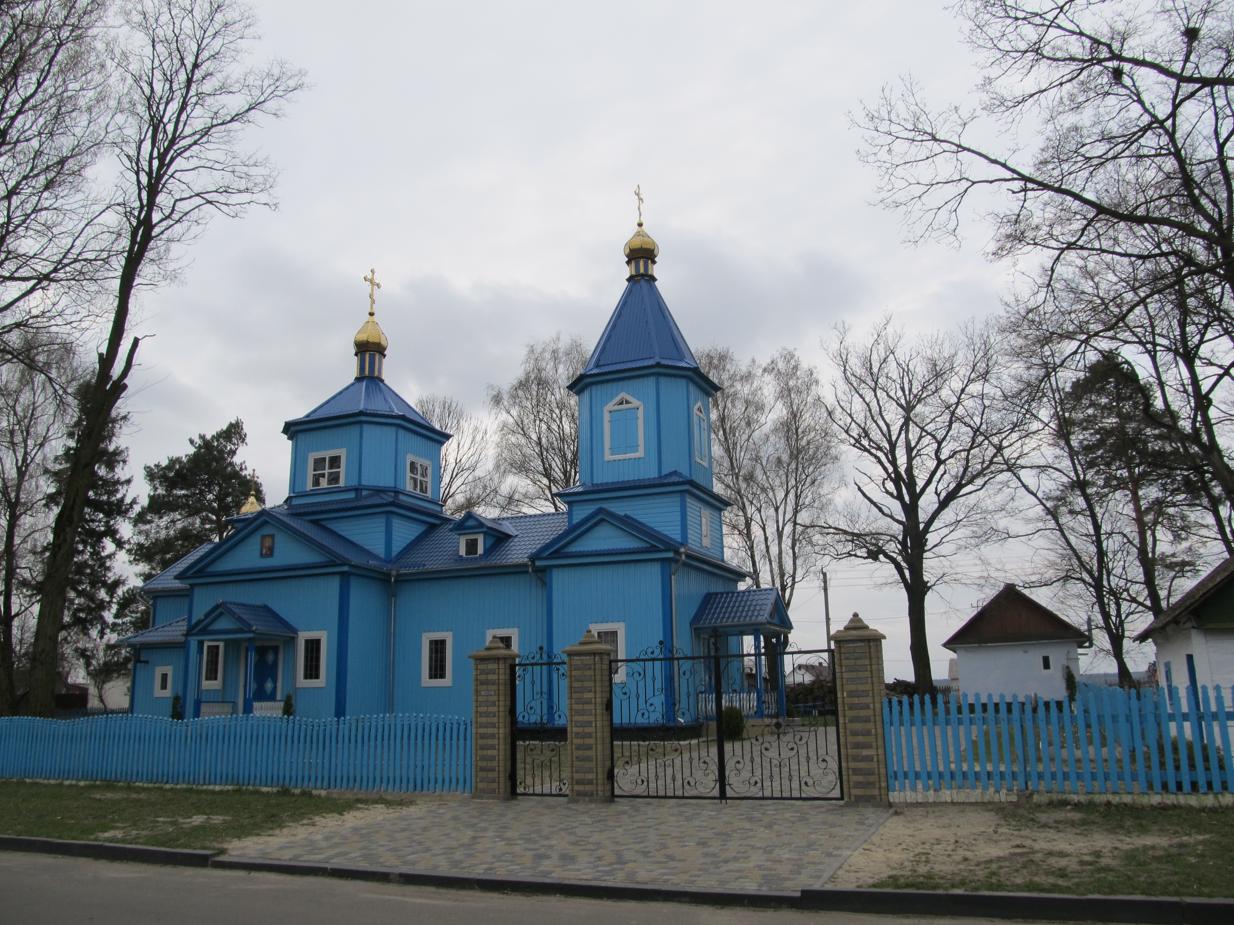 Свято-Миколаївська Церква с. Мирне